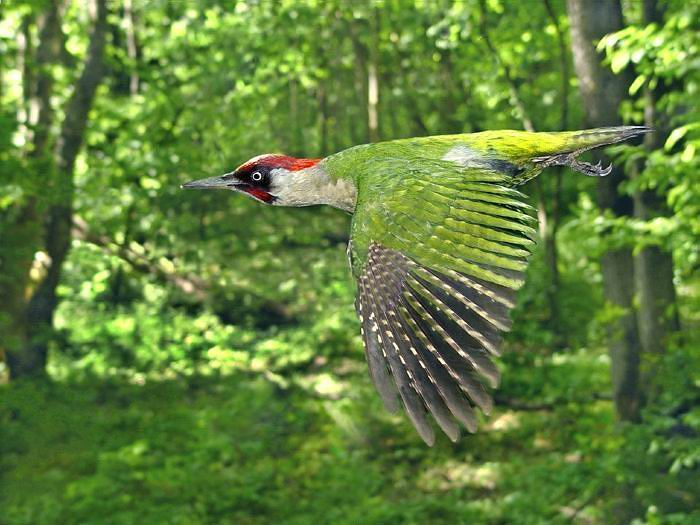 В полёте